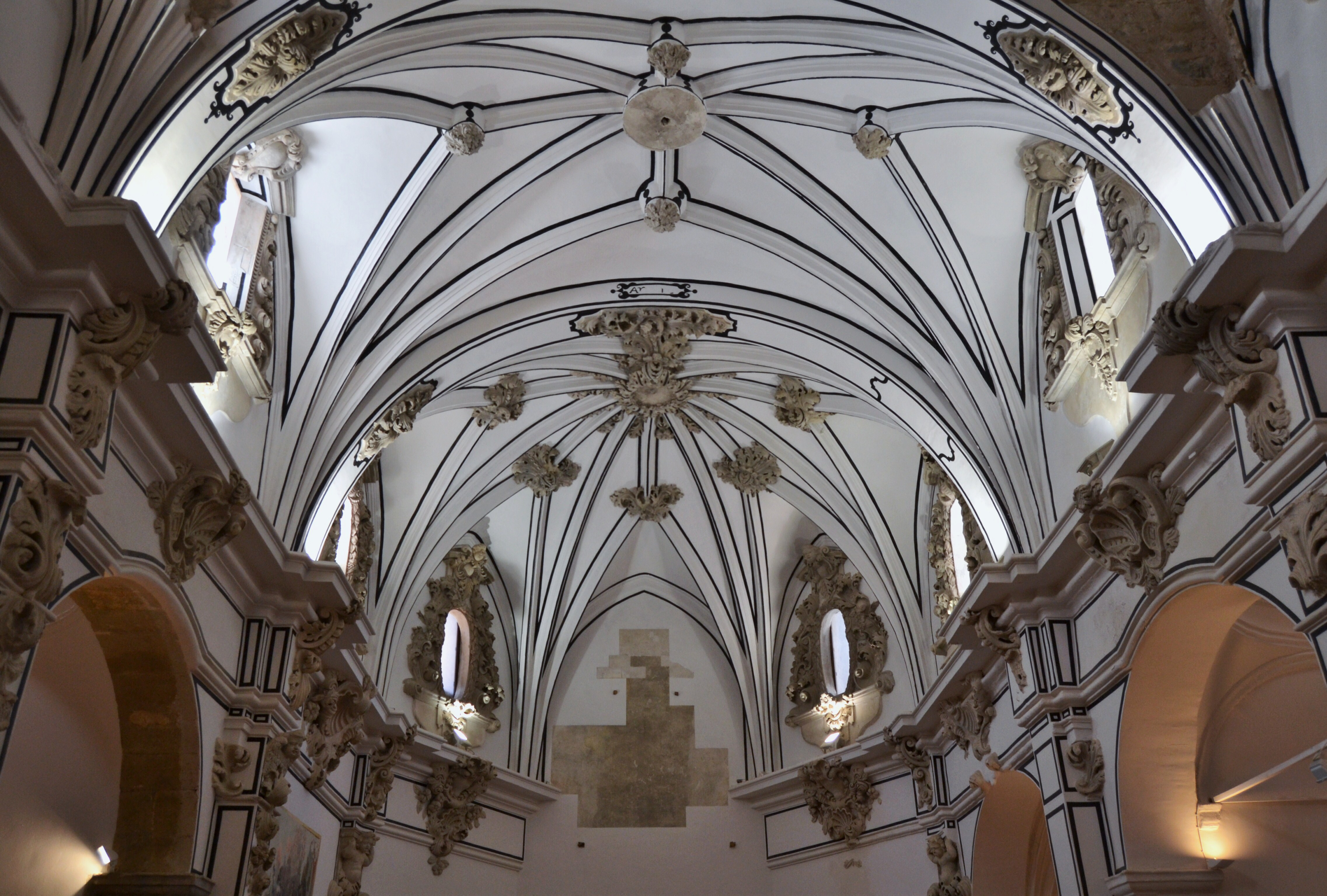 Interior de l'església del Socós de Xèrica.